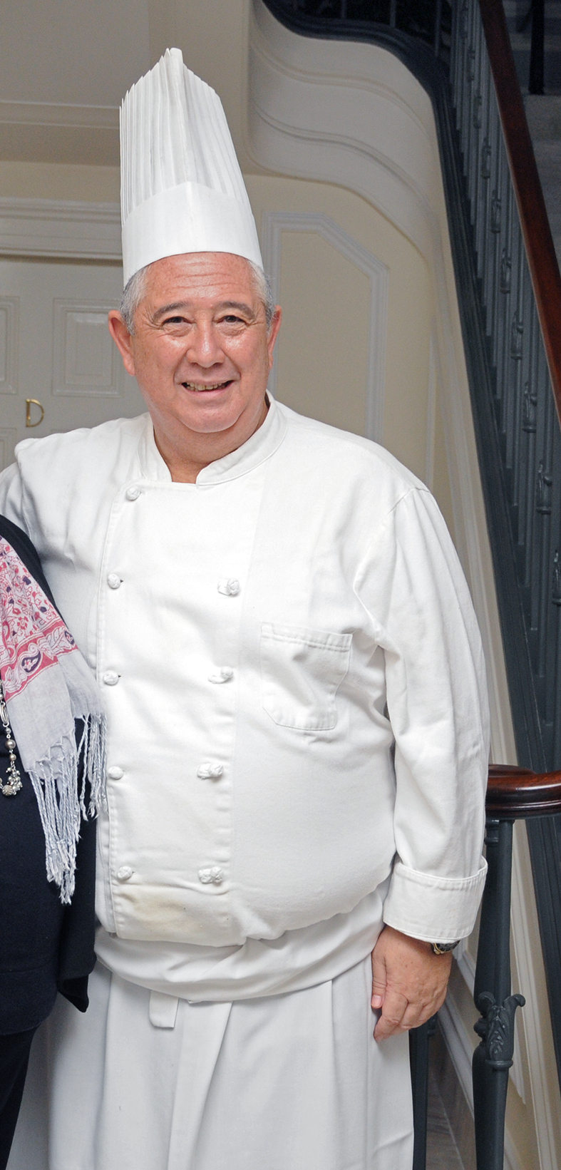 La embajadora de Estados Unidos en Uruguay, Julissa Reynoso, organizó en su residencia una degustación de estos productos para anunciar su ingreso al mercado uruguayo. El evento contó con música en vivo a cargo de Samantha Navarro. [U.S. Embassy photo: Juan Francisco Casal / Copyright info] Artículo completo en goo.gl/cqWOl0